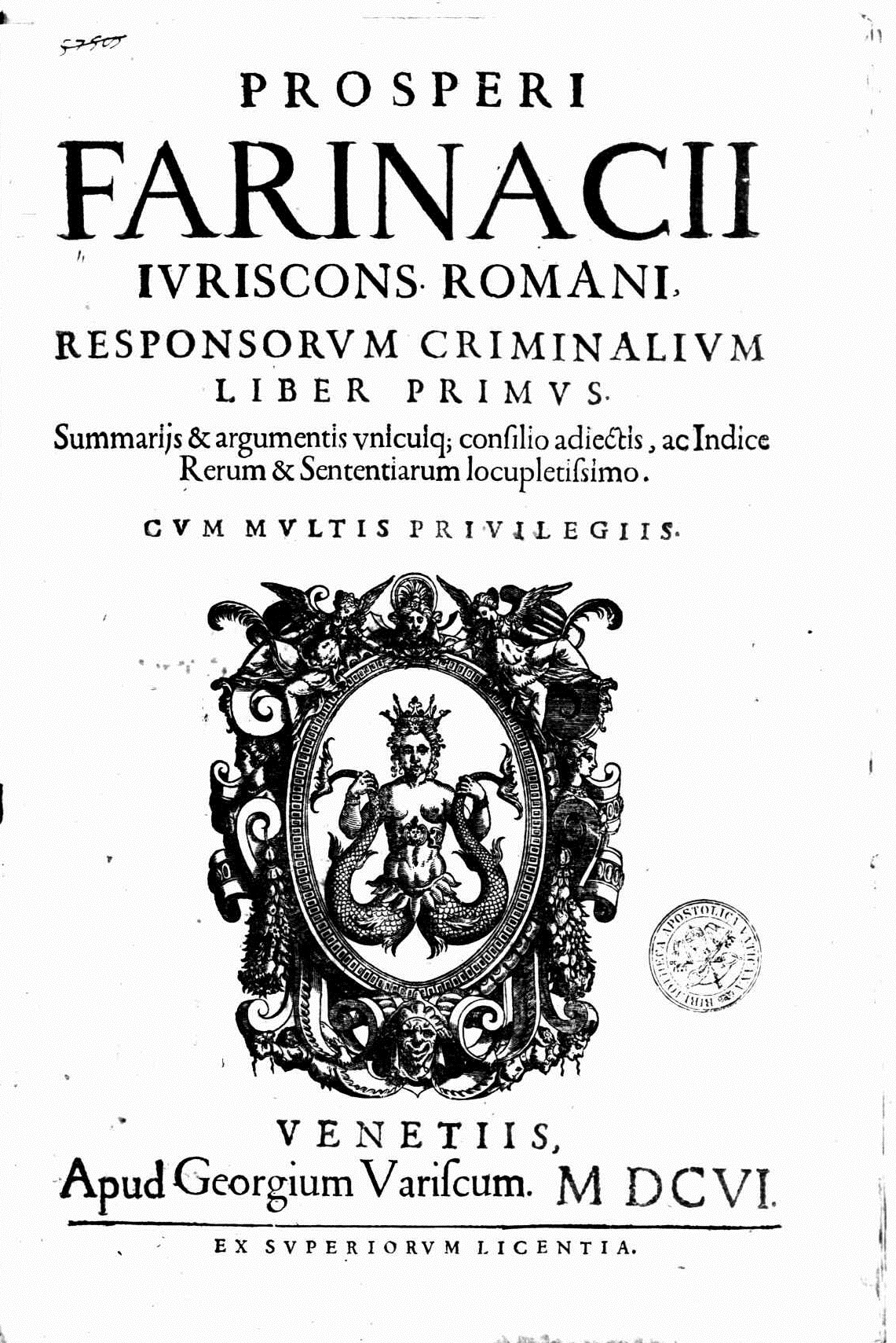 Frontespizio